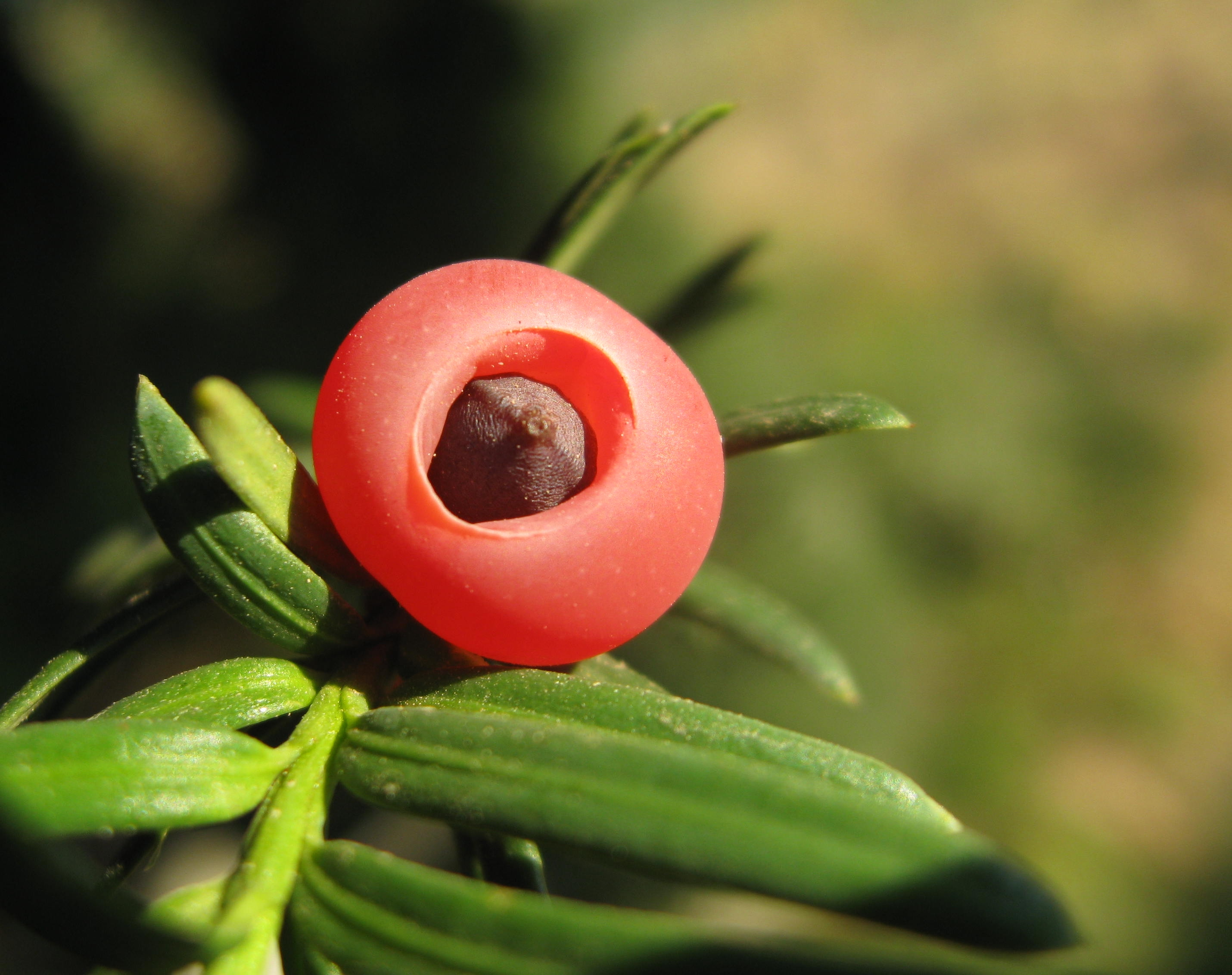 Perkele, propria, Taxus baccata